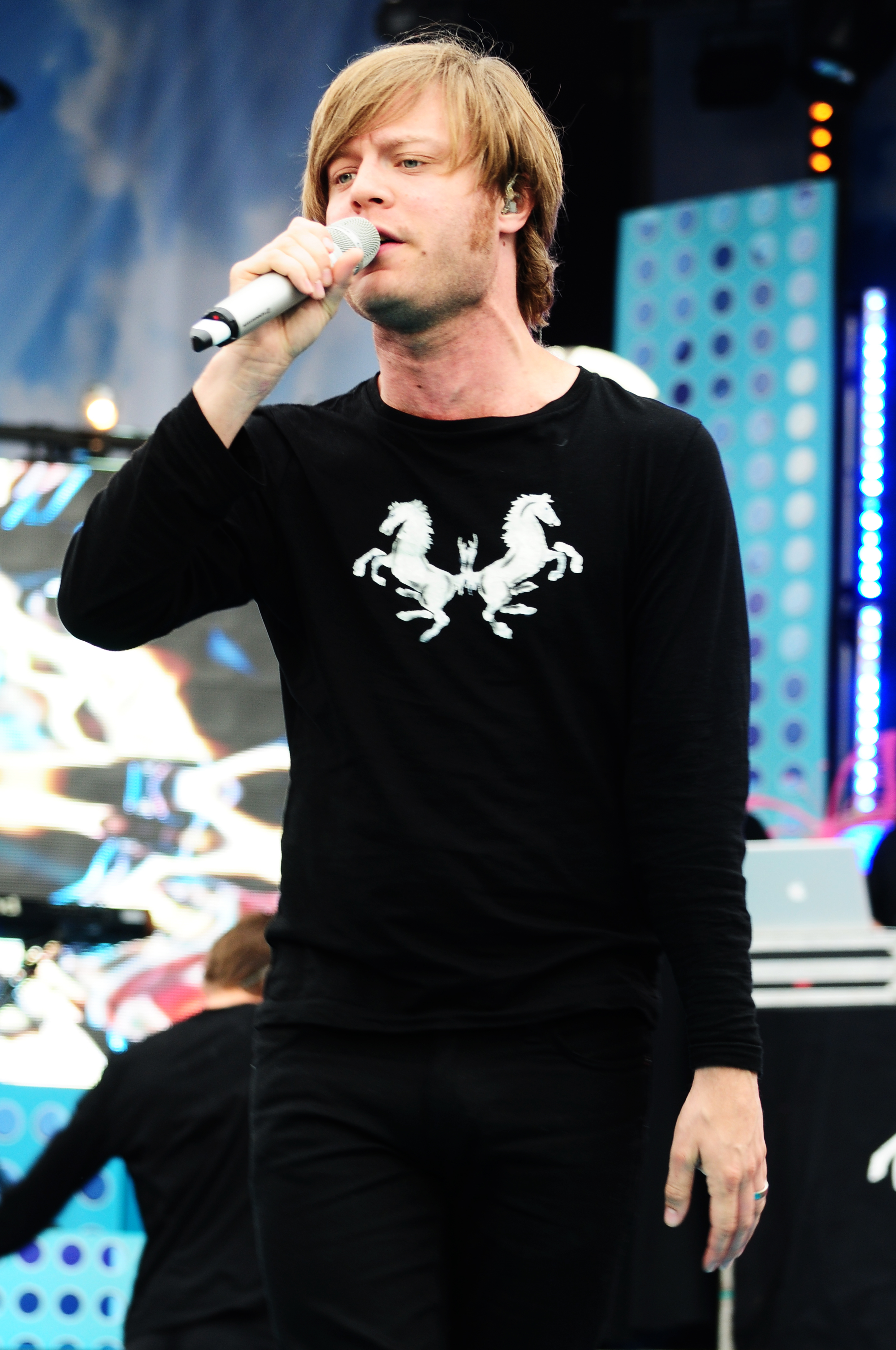 Björn Dixgård På Sommarkrysset